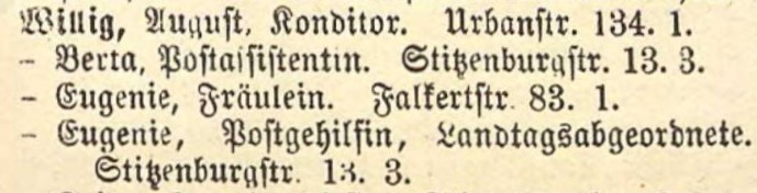 Eintrag zu Eugenie Willig im Adressbuch Stuttgart 1920